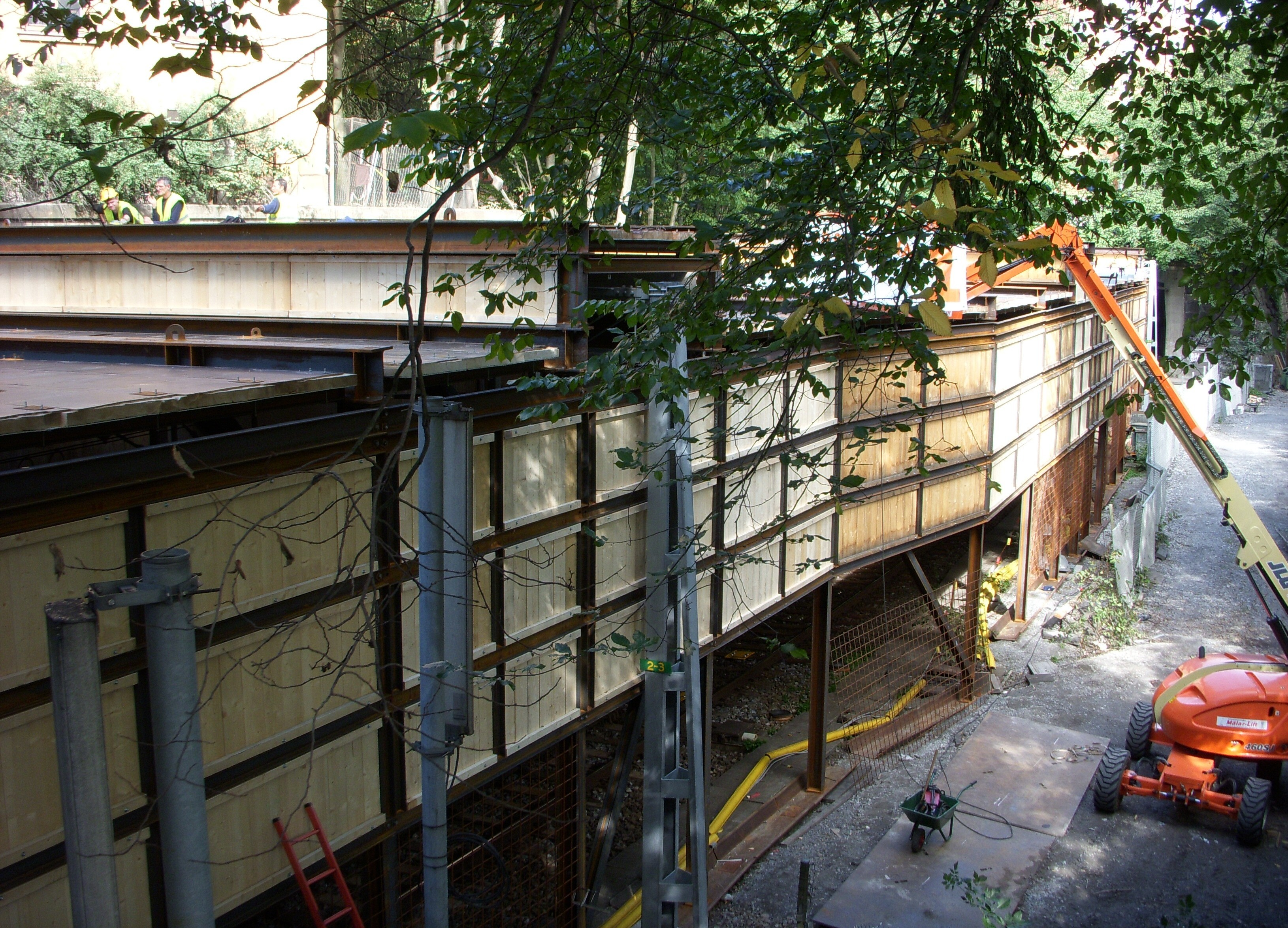 Södertunneln på Södermalm i Stockholm, inklädnad av sista dagsljus-sträckan i samband med Citybanan